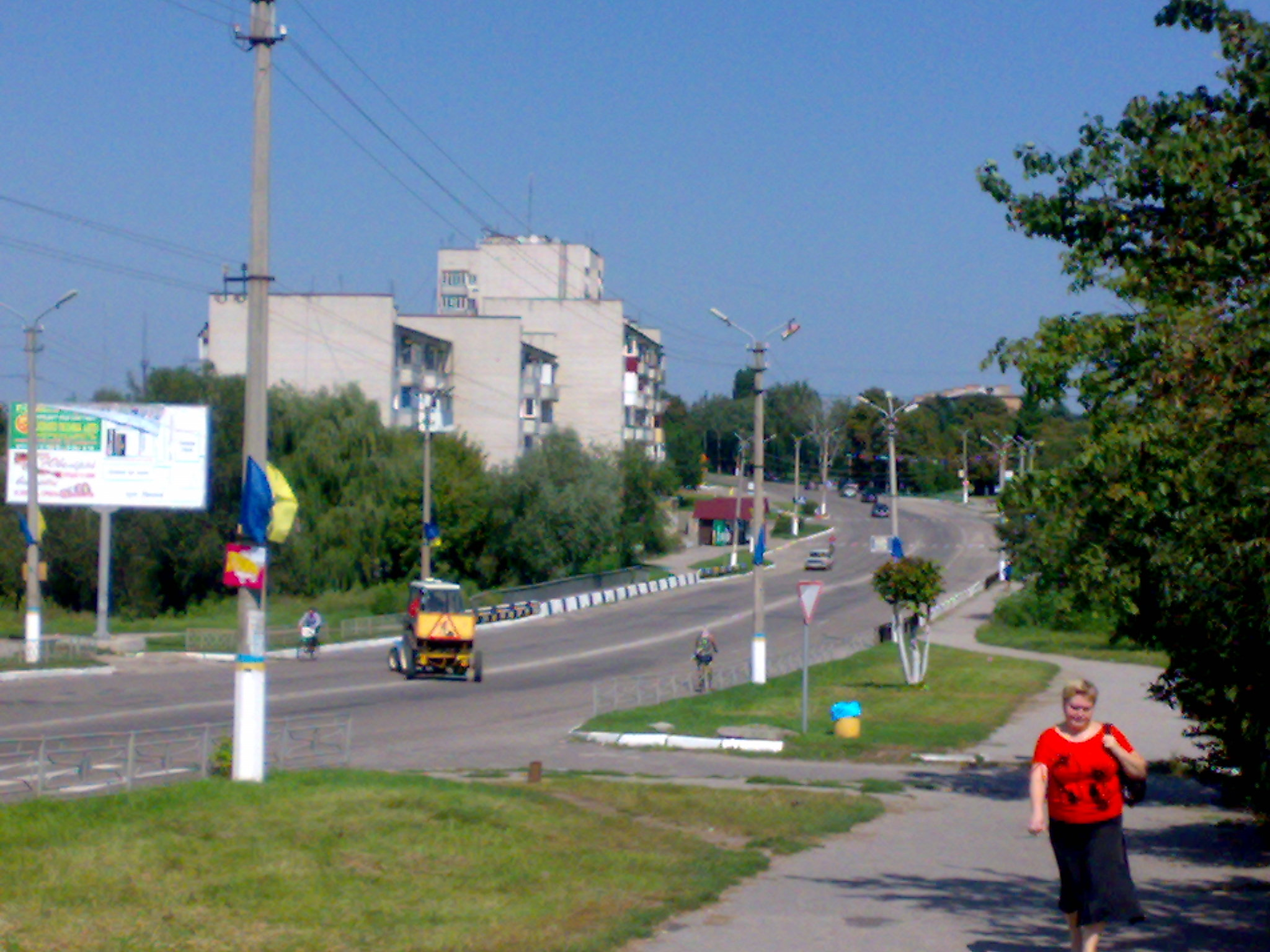 Центр міста